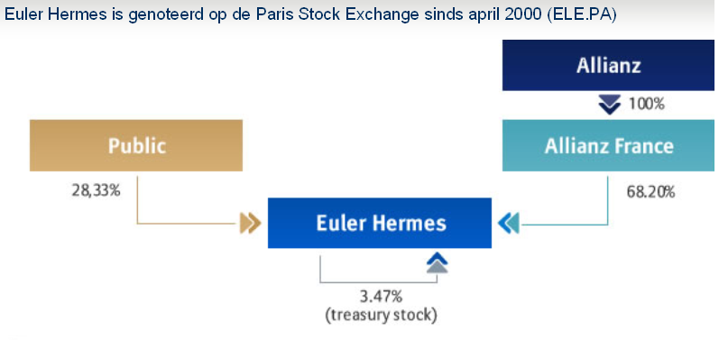 Aandeelhoudersstructuur Euler Hermes